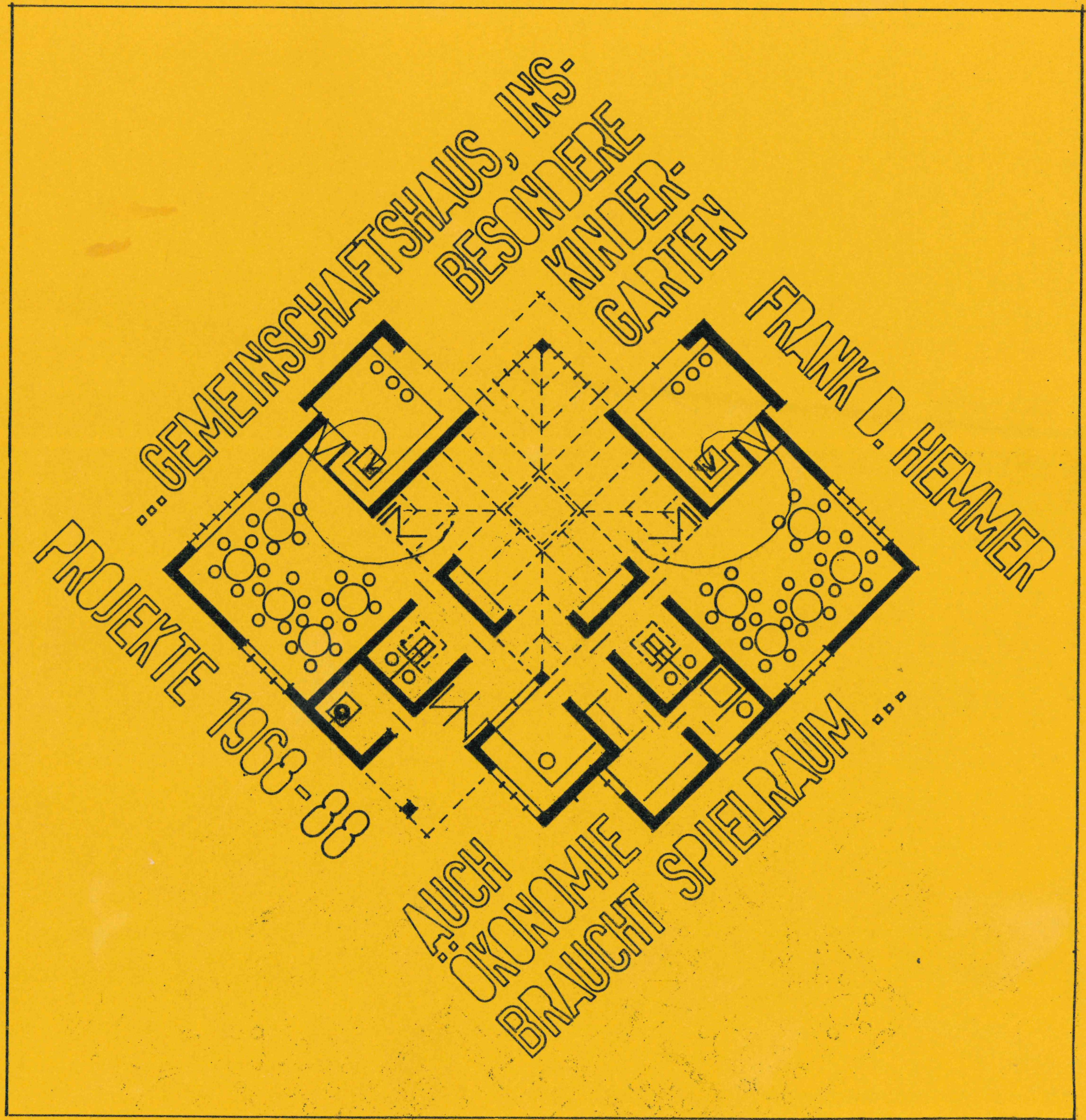 Ttelblatt Projekte 1968 - 1988